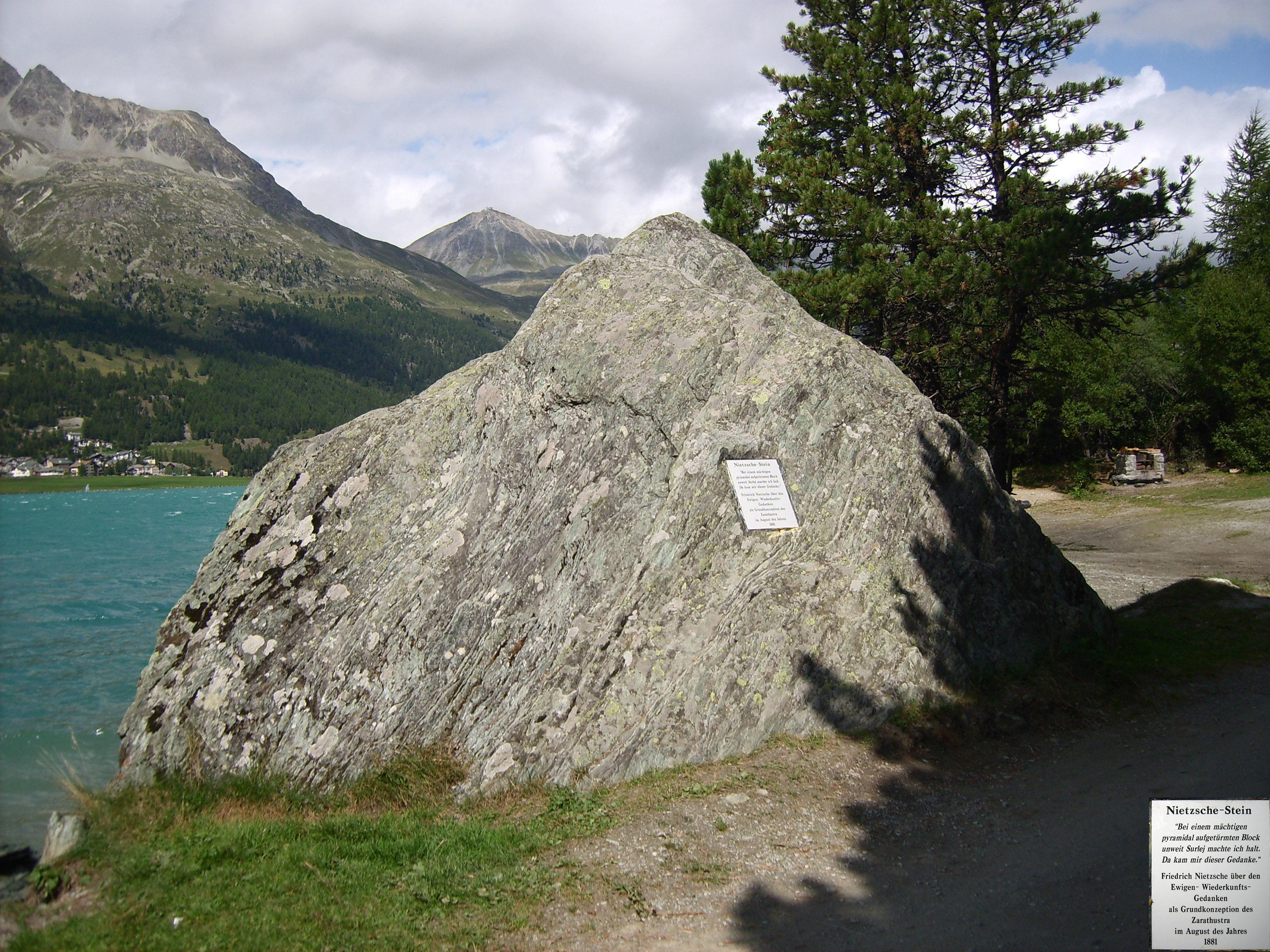 Der Nietzsche-Stein bei Surlej am Silvaplanersee (Oberengadin, Schweiz).